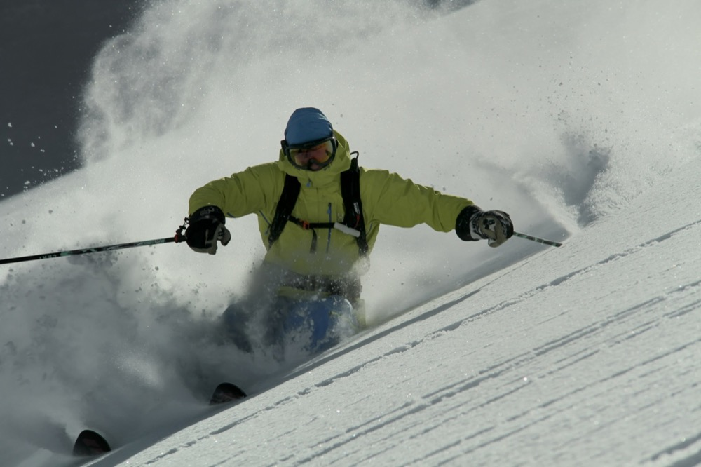 Skiguides freeriding am Arlberg